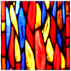 Vitraux de l'église de Troche (fragment)